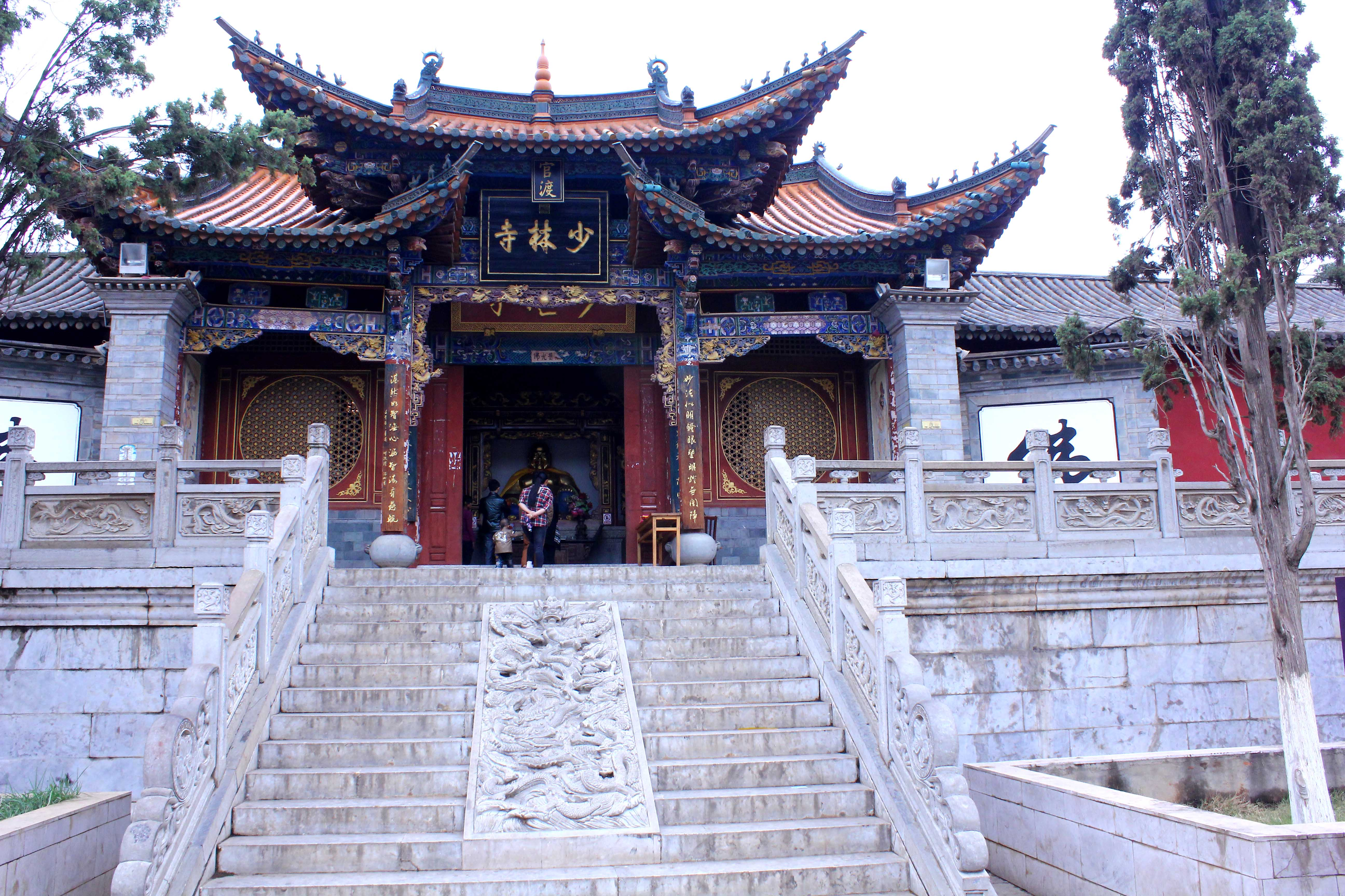 云南昆明官渡古镇妙湛寺，2009年与少林寺合作，现由少林寺托管，故挂牌“官渡少林寺”。